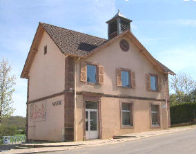 Mairie d'Argiésans (Territoire de Belfort) Photo prise le 20 avril 2004 par LP90. Licence GFDL LP90 avril 2004